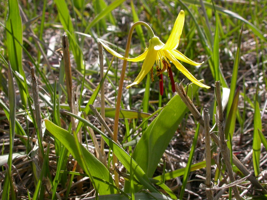 Erythronium grandiflorum